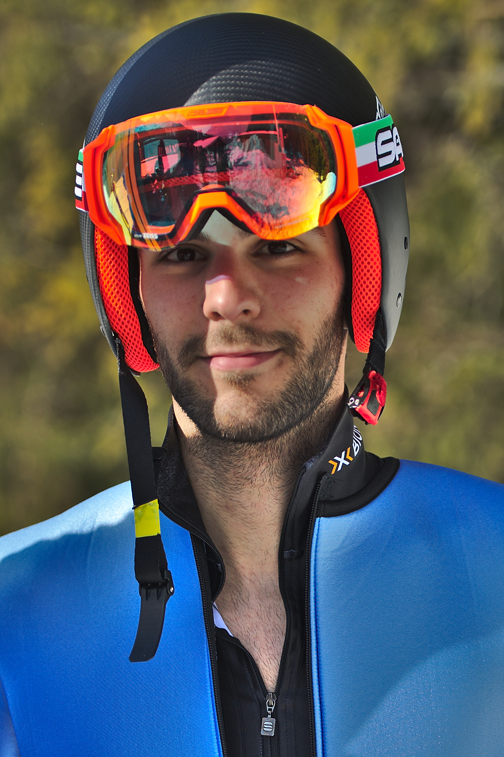 Raffaele Buzzi beim Continental Cup der Nordischen Kombination in Eisenerz/Steiermark 2017